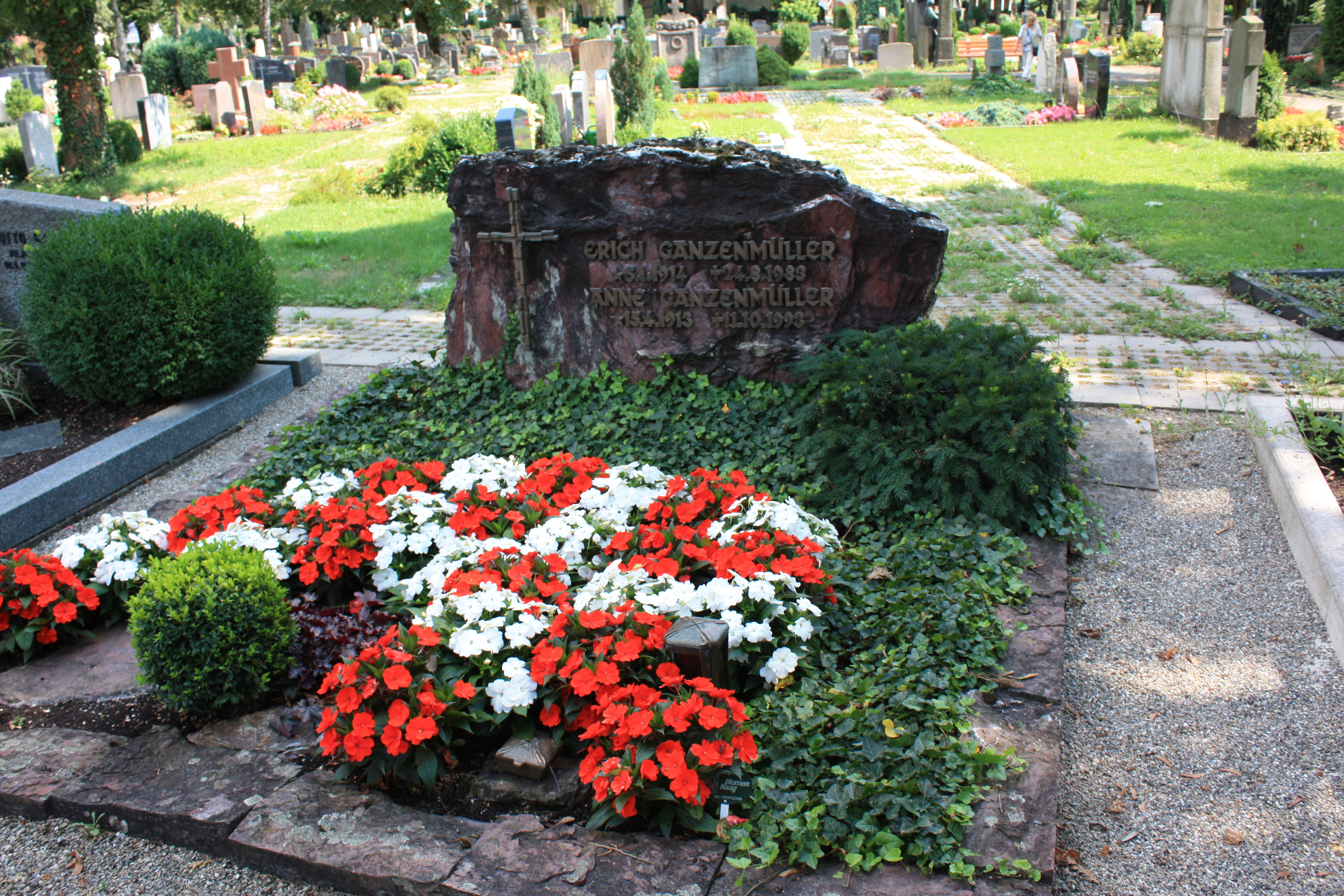 Grabstätte von Erich Ganzenmüller, Politiker (CDU) und Landtagspräsident Baden-Württembergs.